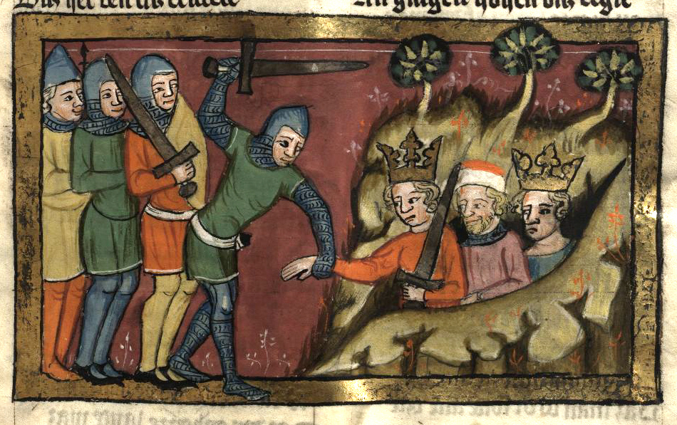 Rudolf von Ems: Weltchronik. Böhmen (Prag), 3. Viertel 14. Jahrhundert. Hochschul- und Landesbibliothek Fulda, Aa 88. Bildbeschreibung nach Martin Roland. Miniatur 83 157r Die fünf Könige werden aus ihren Verstecken geführt